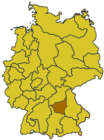 Karte Bistum Eichstätt